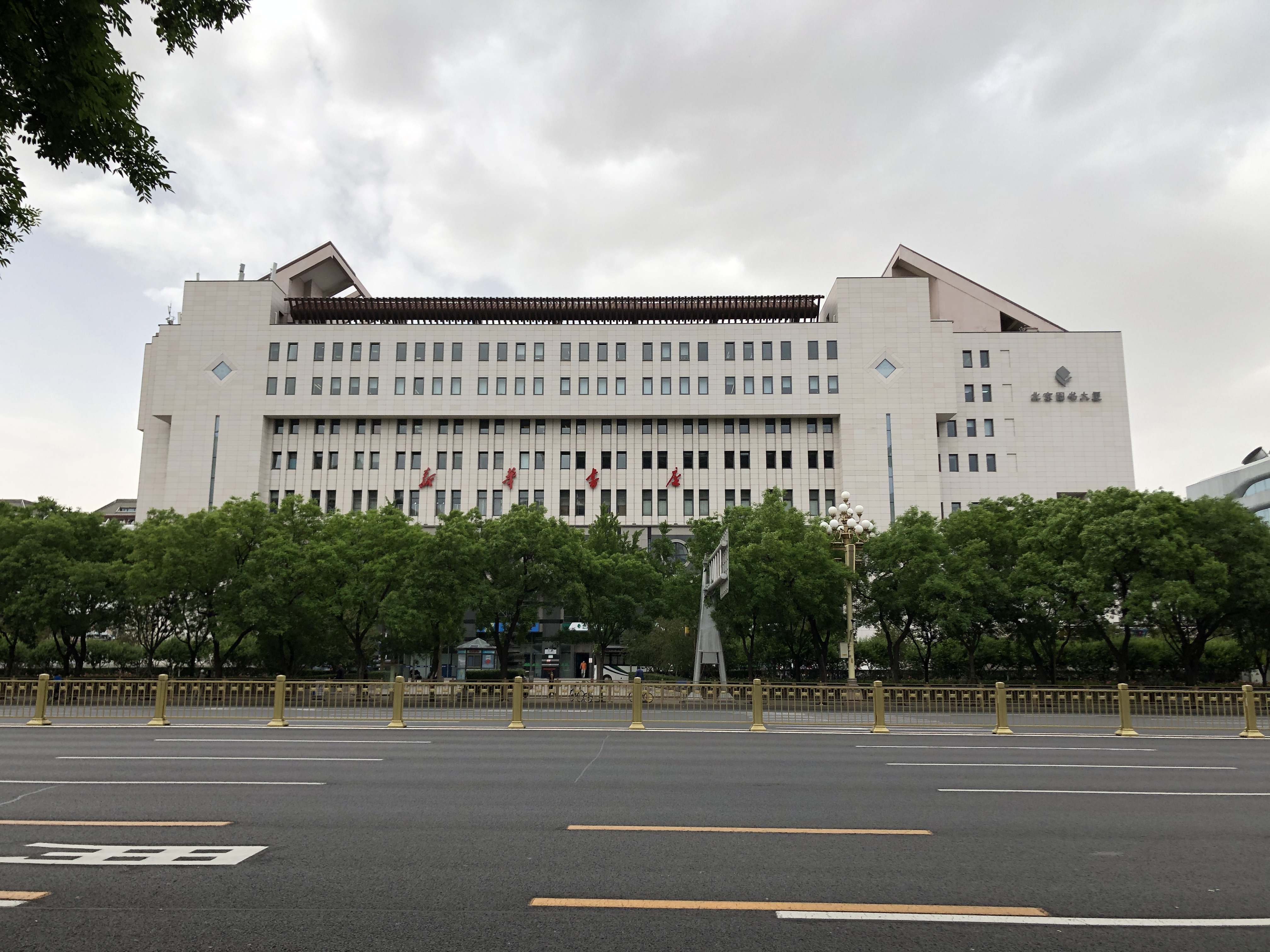 中文（中国大陆）: 2020年北京图书大厦